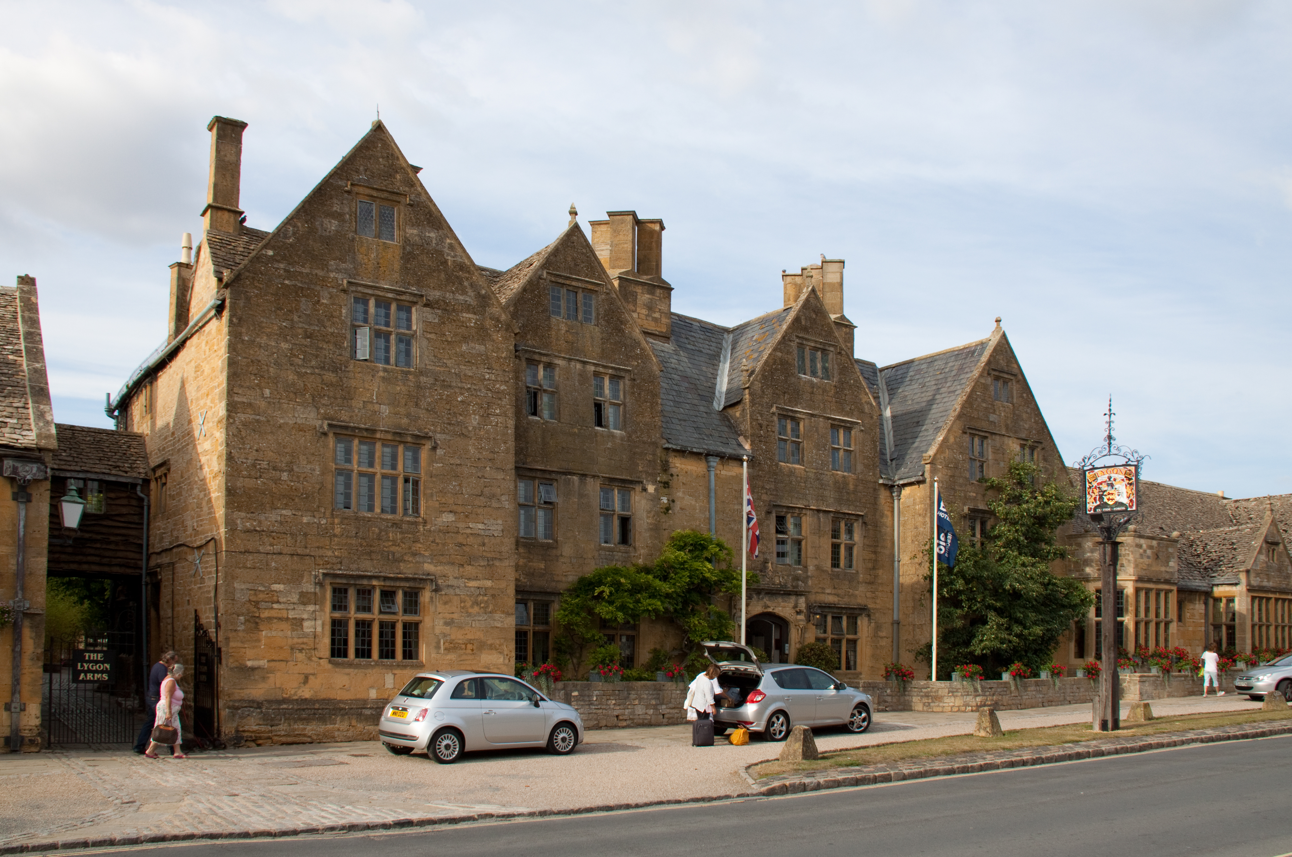 Lygon Arms Broadway